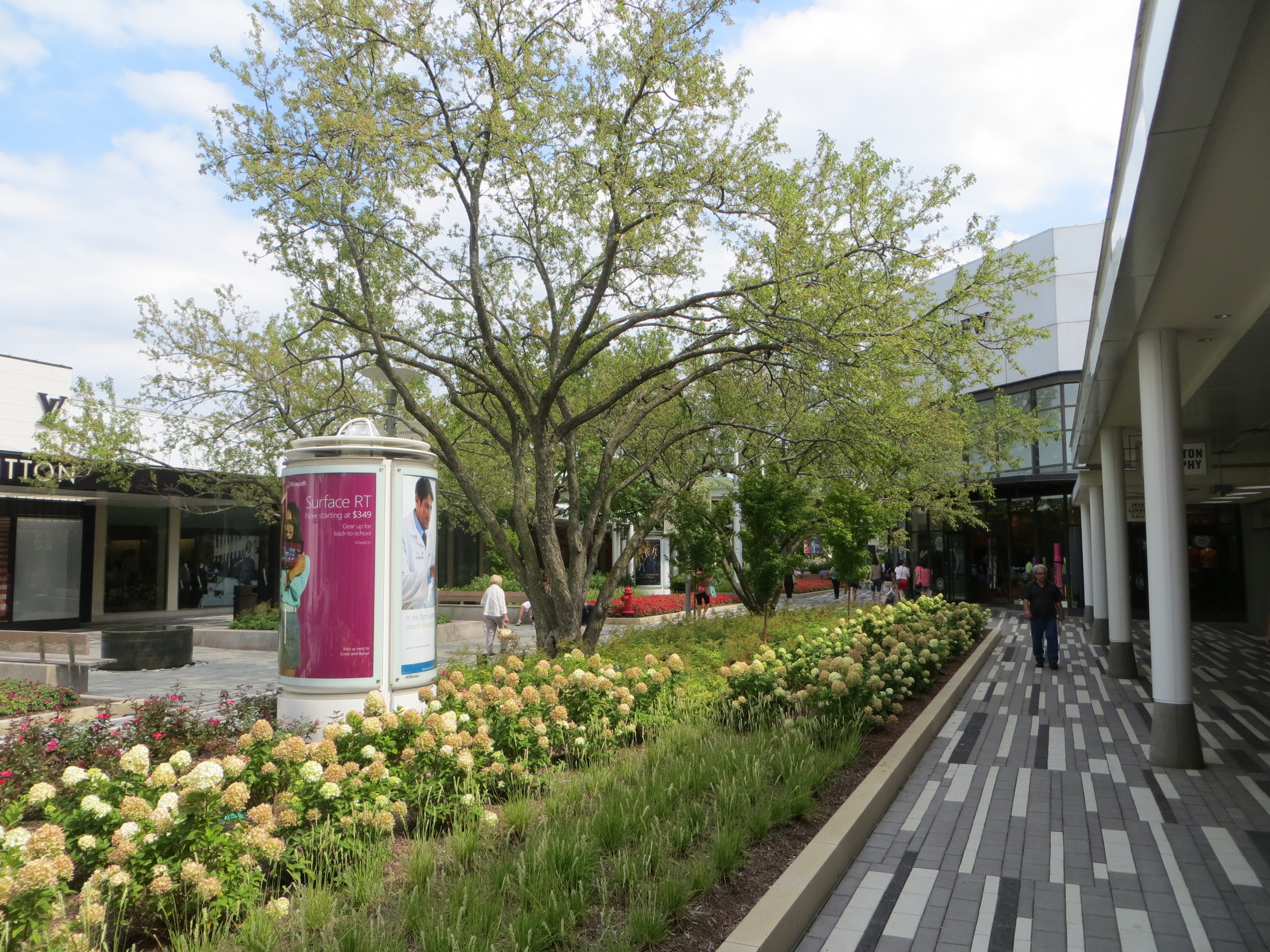 20130810 02 Oak Brook Shopping Center